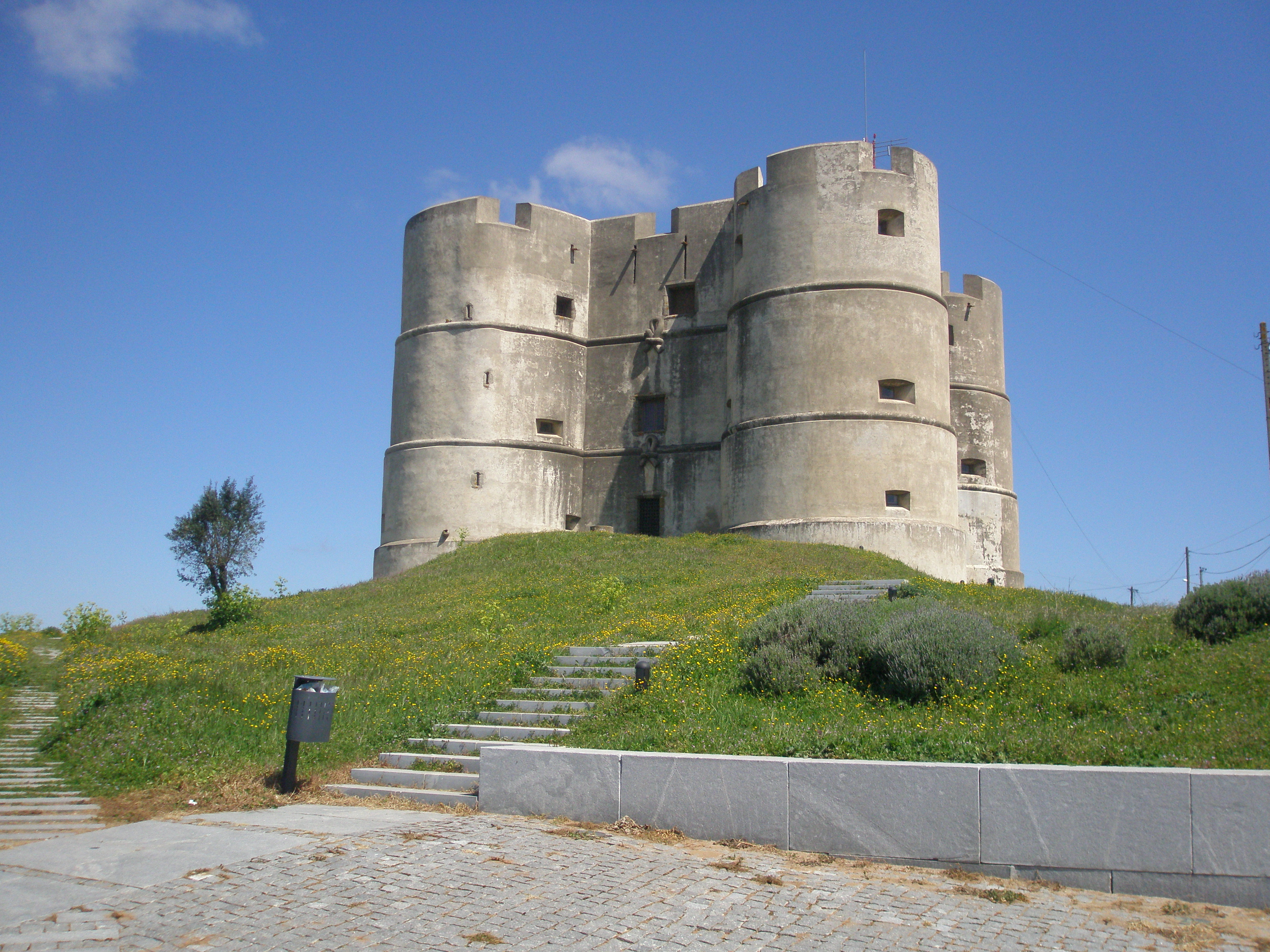 Evoramonte Castle